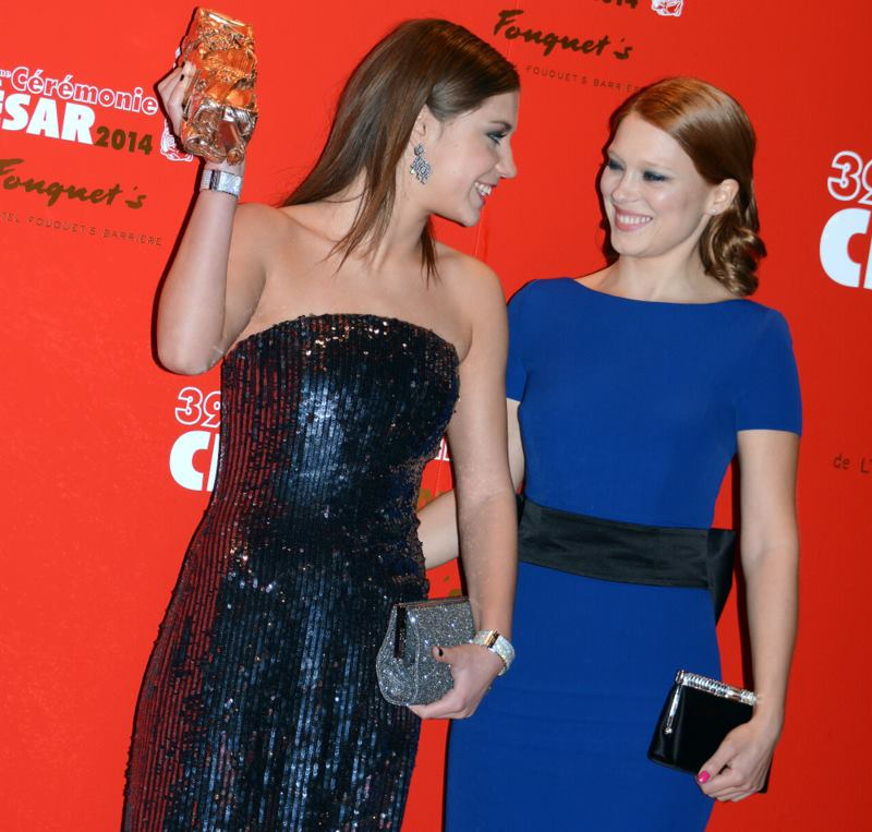 Léa Seydoux et Adèle Exarchopoulos à la cérémonie des César